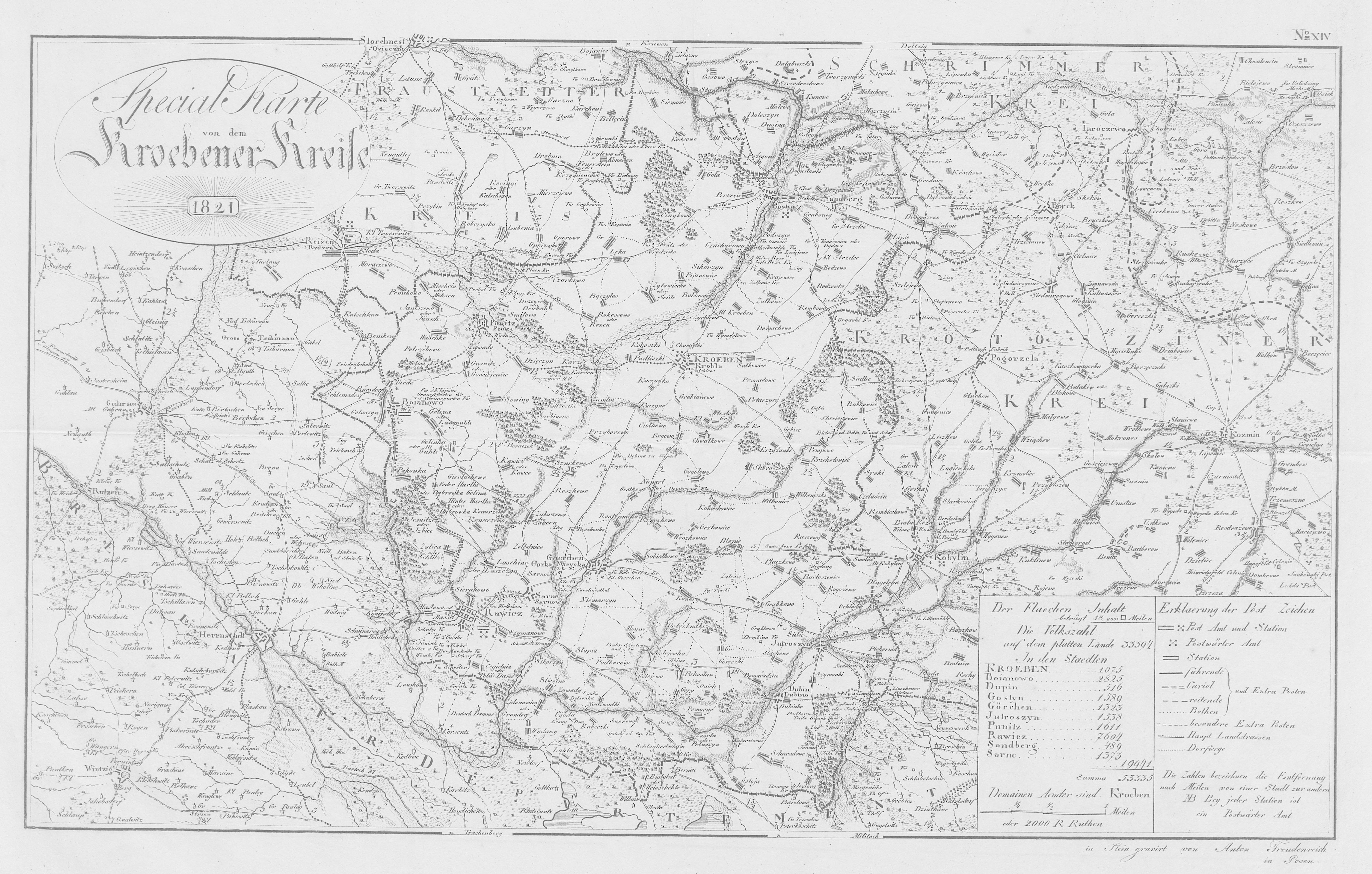 Kreis Kröben as from 1818 to 1887